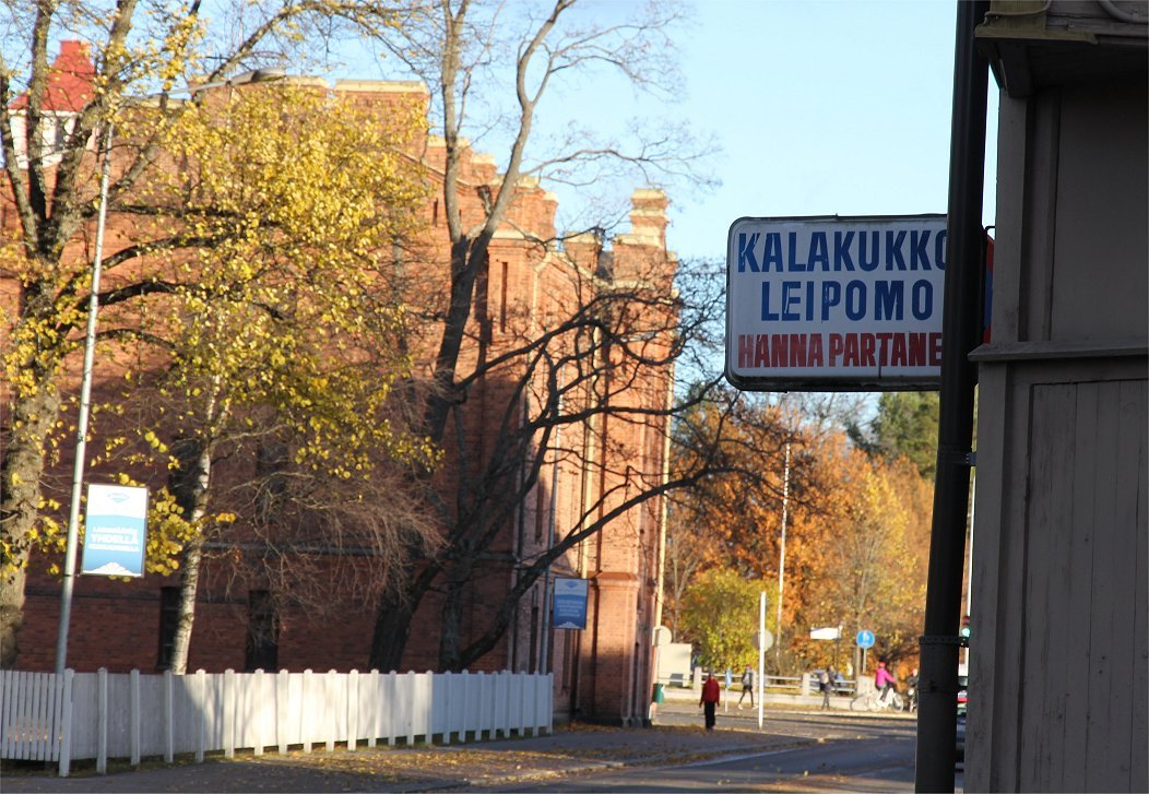 Hanna Partanen (1891–1969) oli Suomen kuuluisin kalakukkoleipuri. Kukkoja tehdään edelleen perinteisen tavan mukaan käsityönä ja suomalaisista raaka-aineista (tärkein suomalainen ruis) Kuopion keskustassa Kasarmikadulla sijaitsevassa leipomossa. Hanna Partasen nimeä kantava leipomo työllistää vuodenajoista riippuen 10–20 työntekijää.